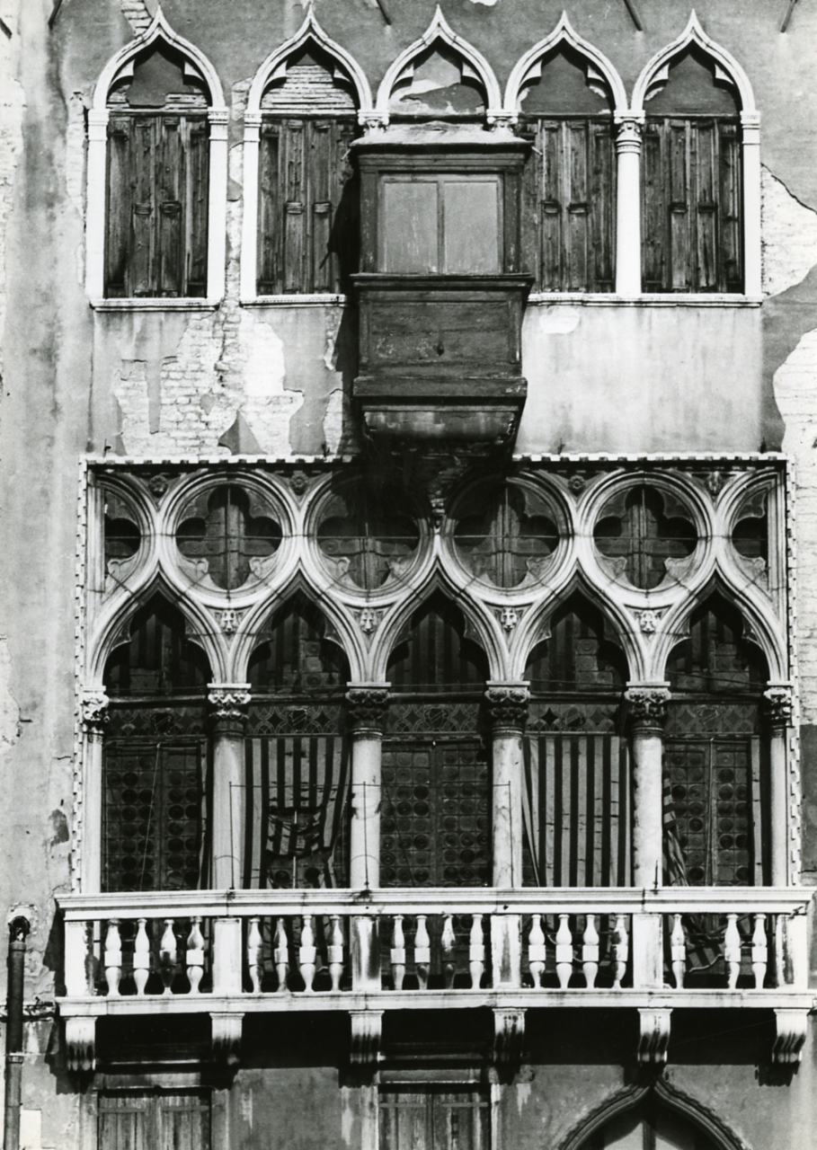 Servizio fotografico : Venezia, 1969 / Paolo Monti. - Stampe: 8 : Positivo b/n, gelatina bromuro d'argento/ carta, 18x24, 24x30. - ((Al verso delle stampe manoscritti i numeri dei negativi corrispondenti (formato 35 mm) con indicazione del fotogramma: 88[tagliato]; iscrizioni didascaliche manoscritte a matita; timbro a inchiostro con copyright (Via Tasso - Milano). - Sul coperchio della scatola iscrizione didascalica manoscritta a pennarello nero: "Venezia gotica". - Occasione: Documentazione per la pubblicazione: Arslan Edoardo, "Venezia gotica: architettura civile gotica veneziana", Milano, Electa, 1970. - Fonte: Monografia di Arslan, Edoardo: Venezia gotica: architettura civile gotica veneziana, Milano, Electa (1970)